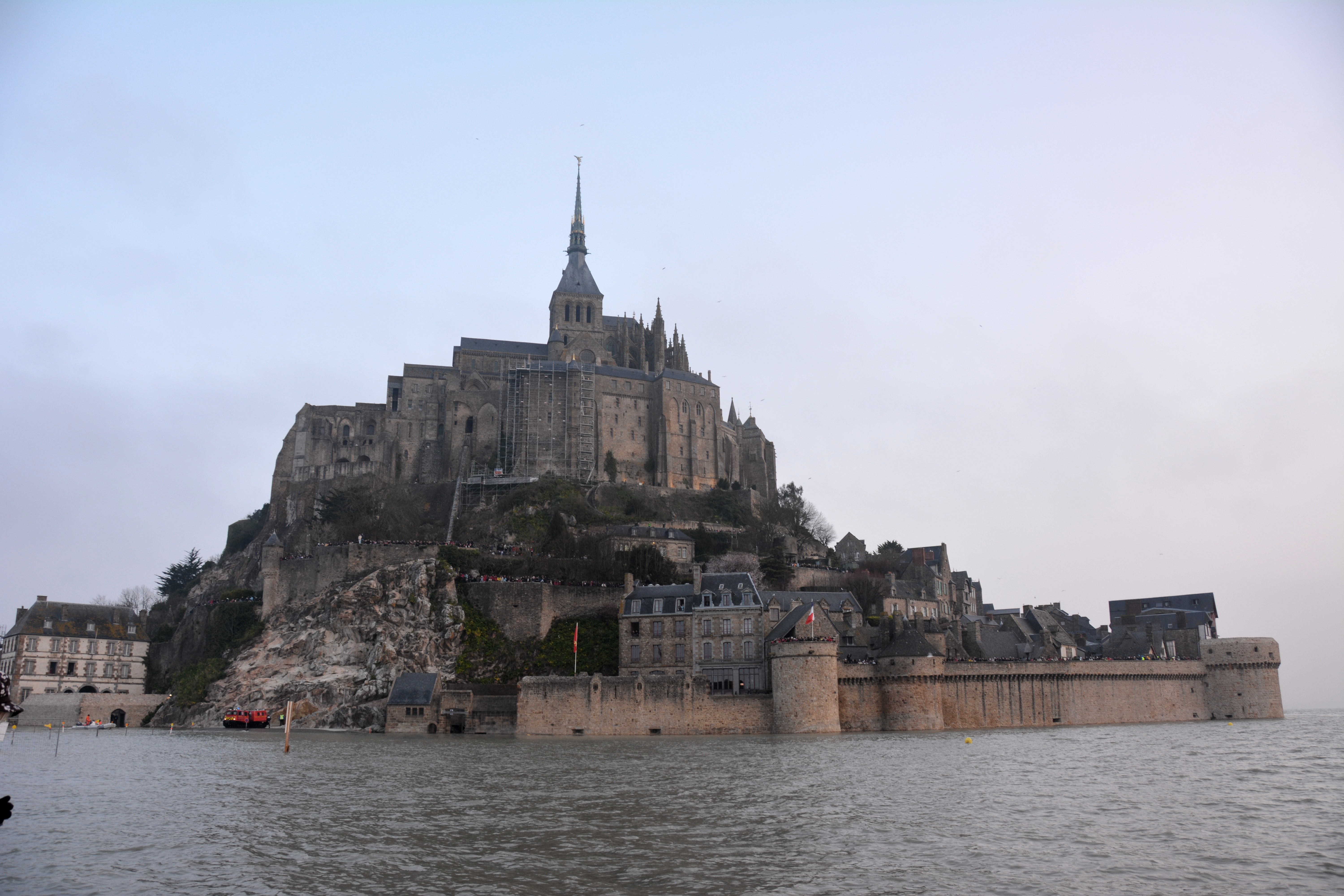 Grandes marées au Mont-Saint-Michel en mars 2015. Coefficient 118 à 07h42. Marée du siècle